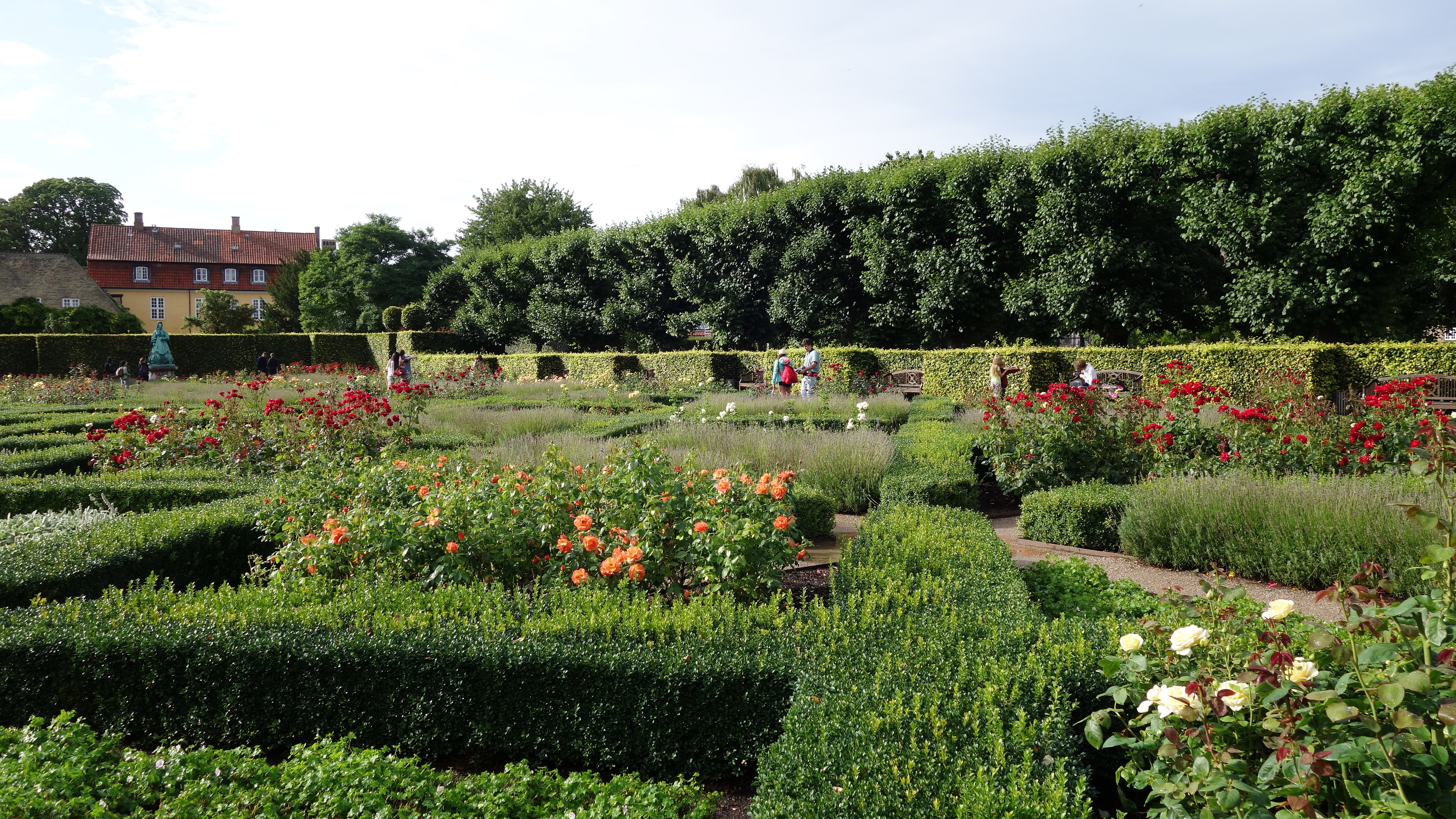 Rose Garden - Rosenhaven - Kongens Have